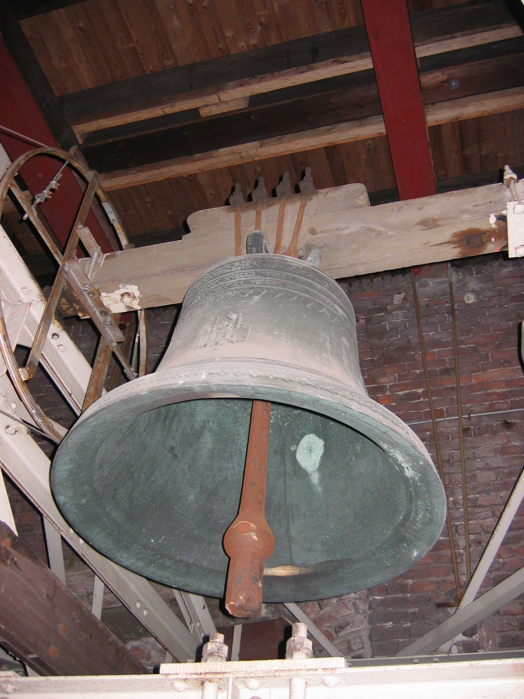 Schutzengelglocke (as') der Maternuskirche in Rodenkirchen.